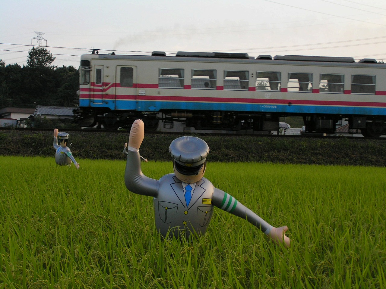 三木鉄道 宗佐ー 国包 007年8月26日、18:03:46